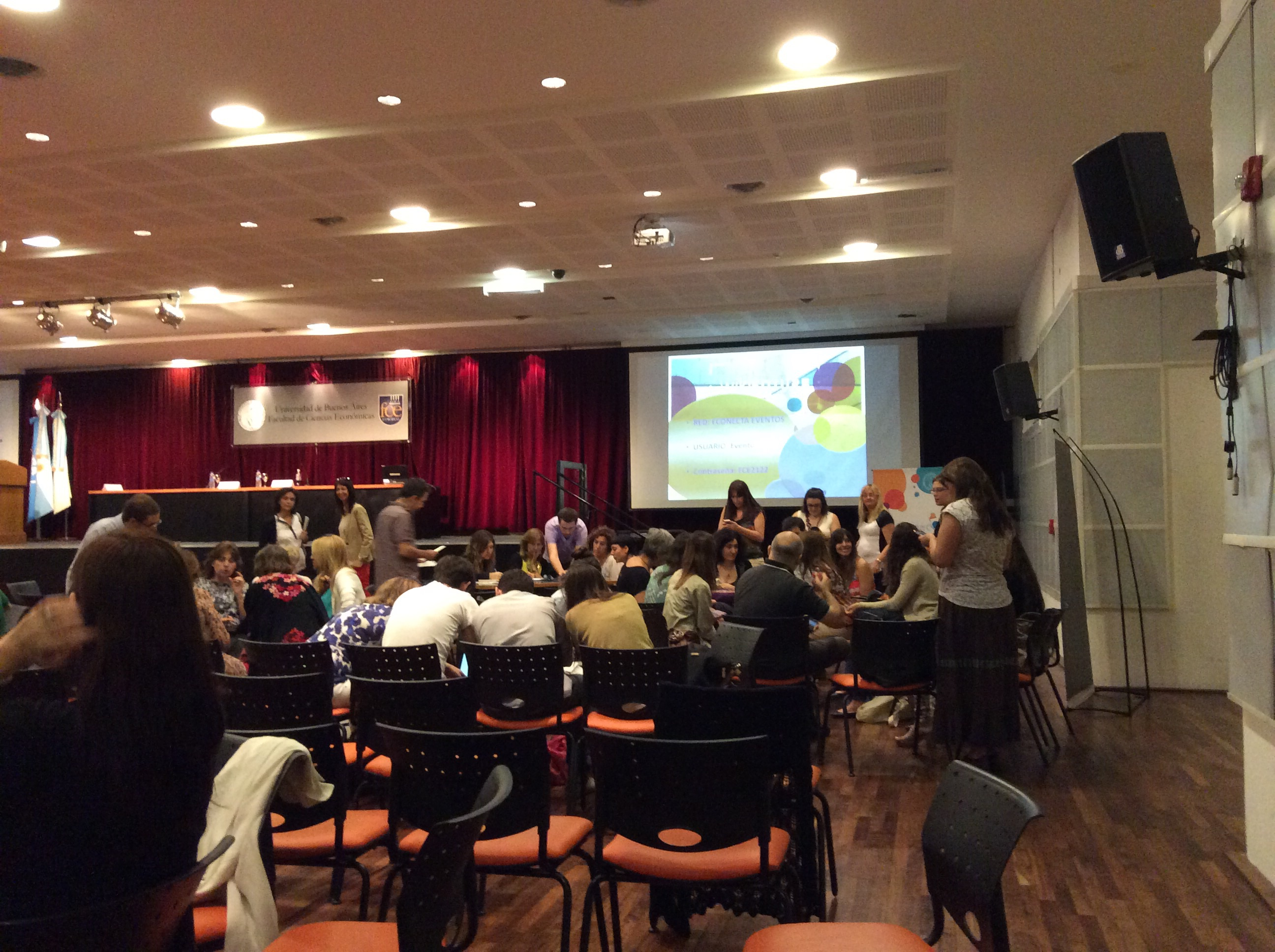 Taller WIkiFuture en Facultad de Ciencias Económicas